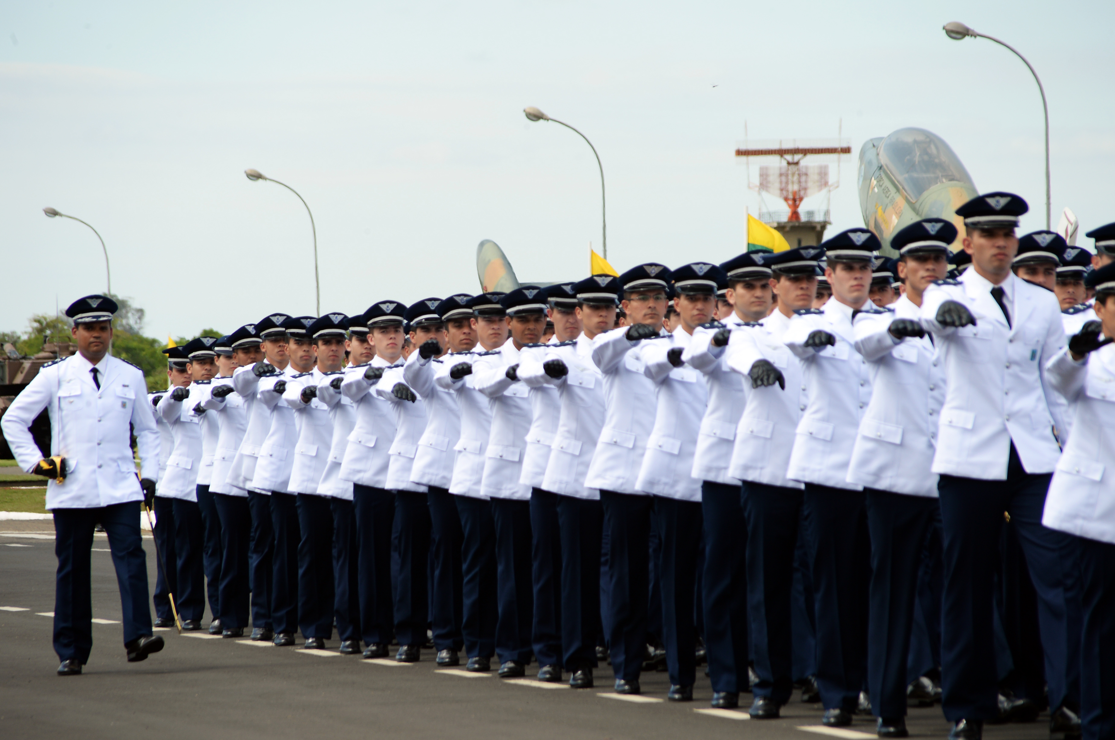 05/12/2014, Pirassununga - SP Fotos: Jorge Cardoso